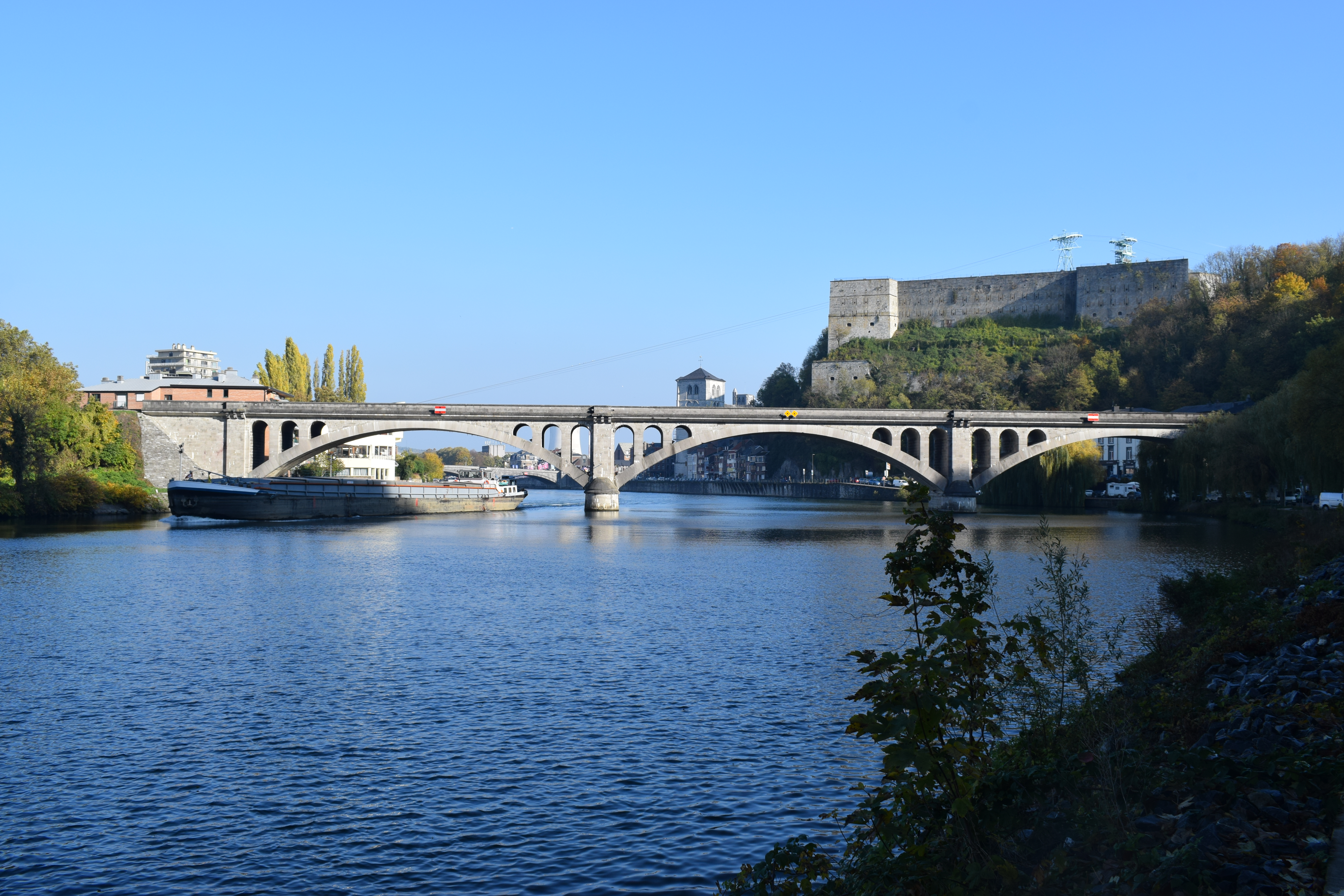 Vue de Huy, depuis la rive droite de la Meuse.